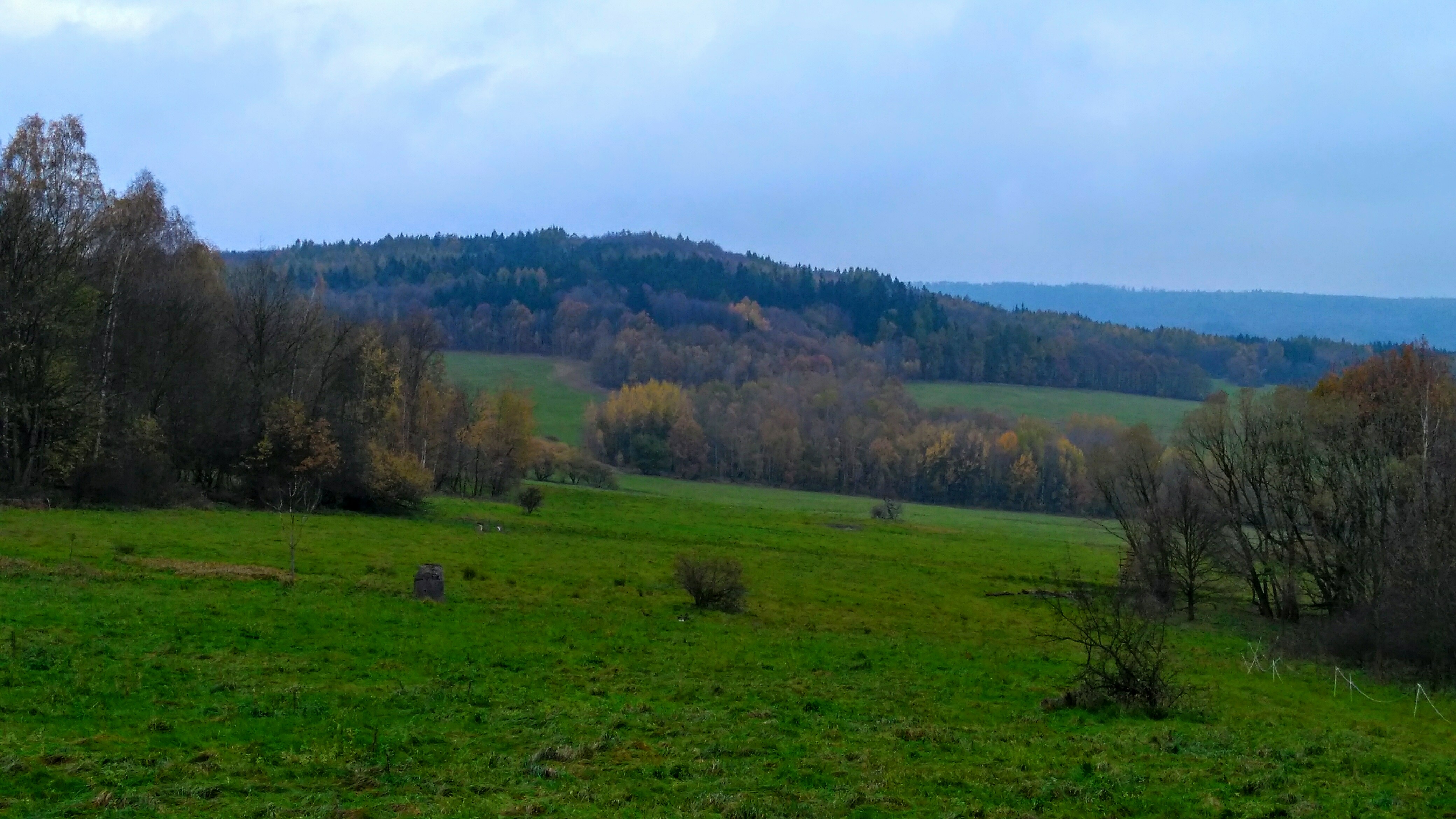 Hora.